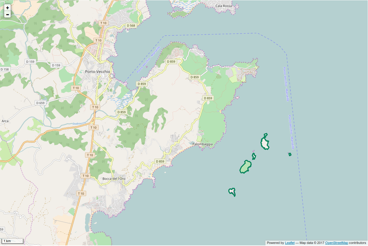 Périmètre de la RNC des Iles Cerbicale.